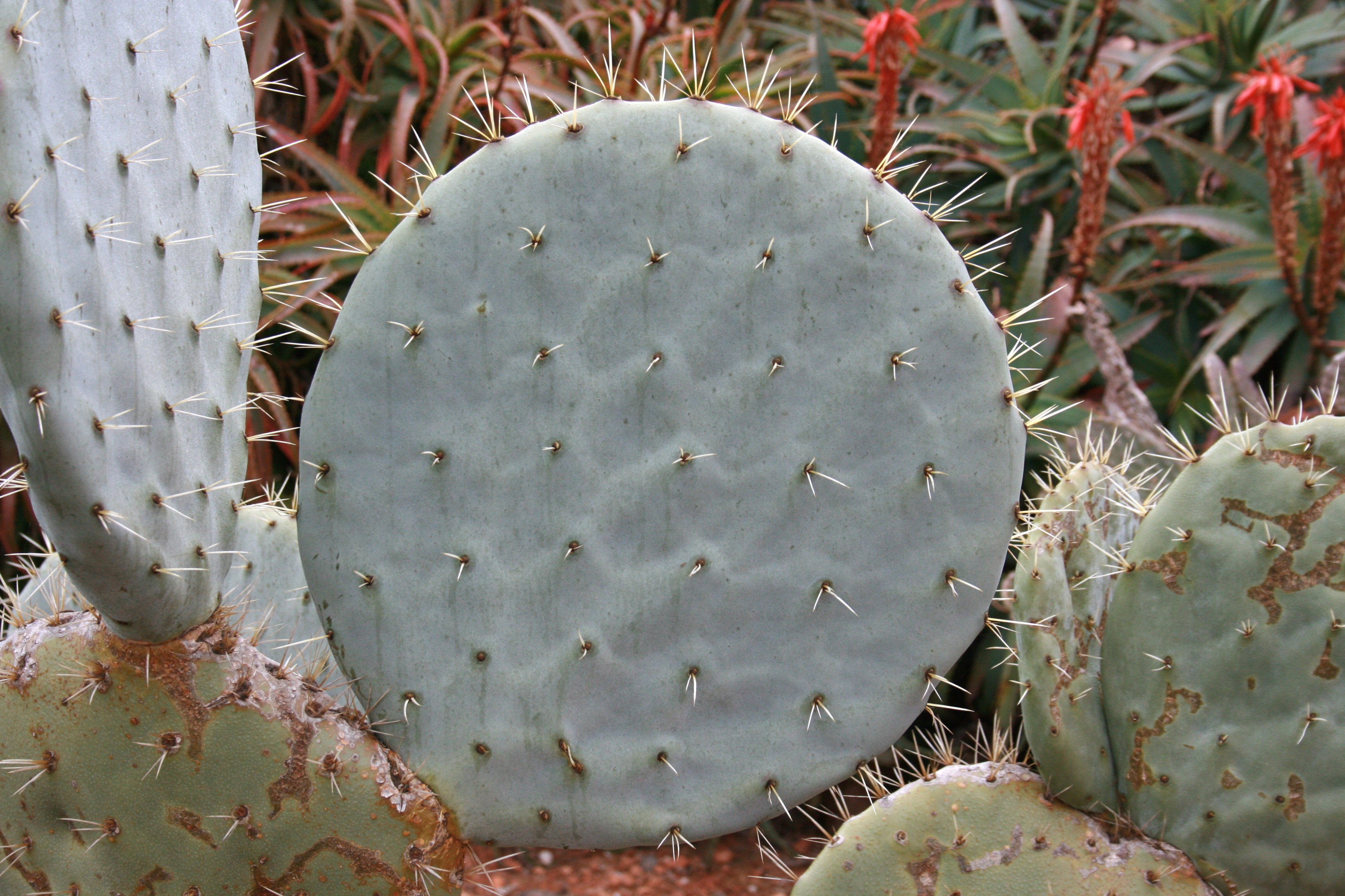 Botanicactus in Ses Salines, Mallorca, Spain